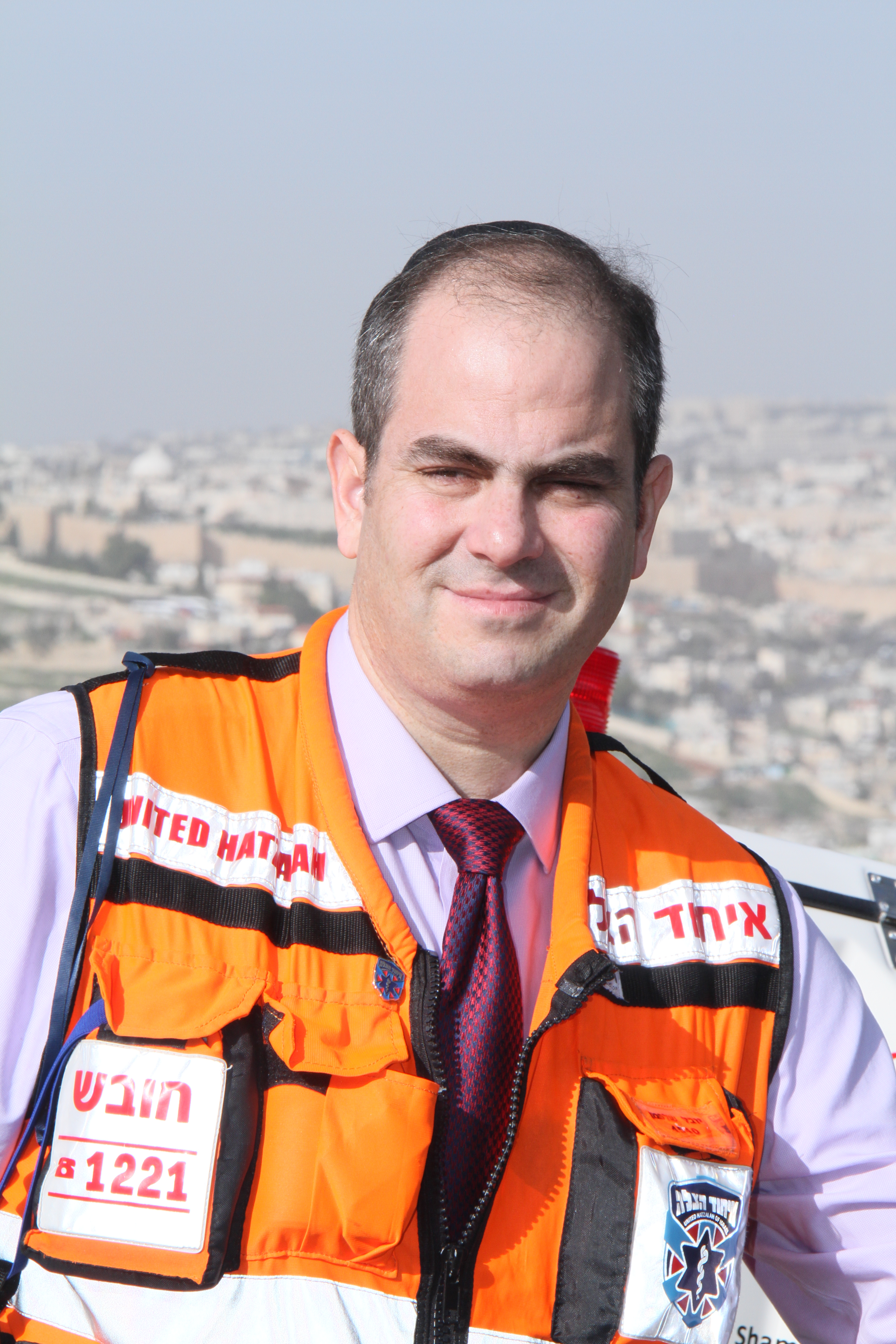 אלי ביר נשיא ומייסד איחוד הצלה